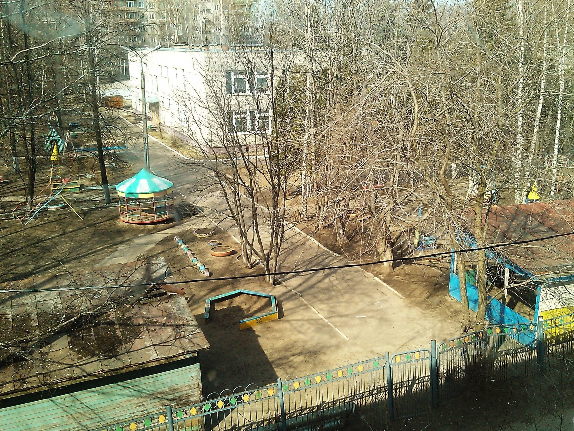 Детский сад №24 в Дядьково, Ярославль